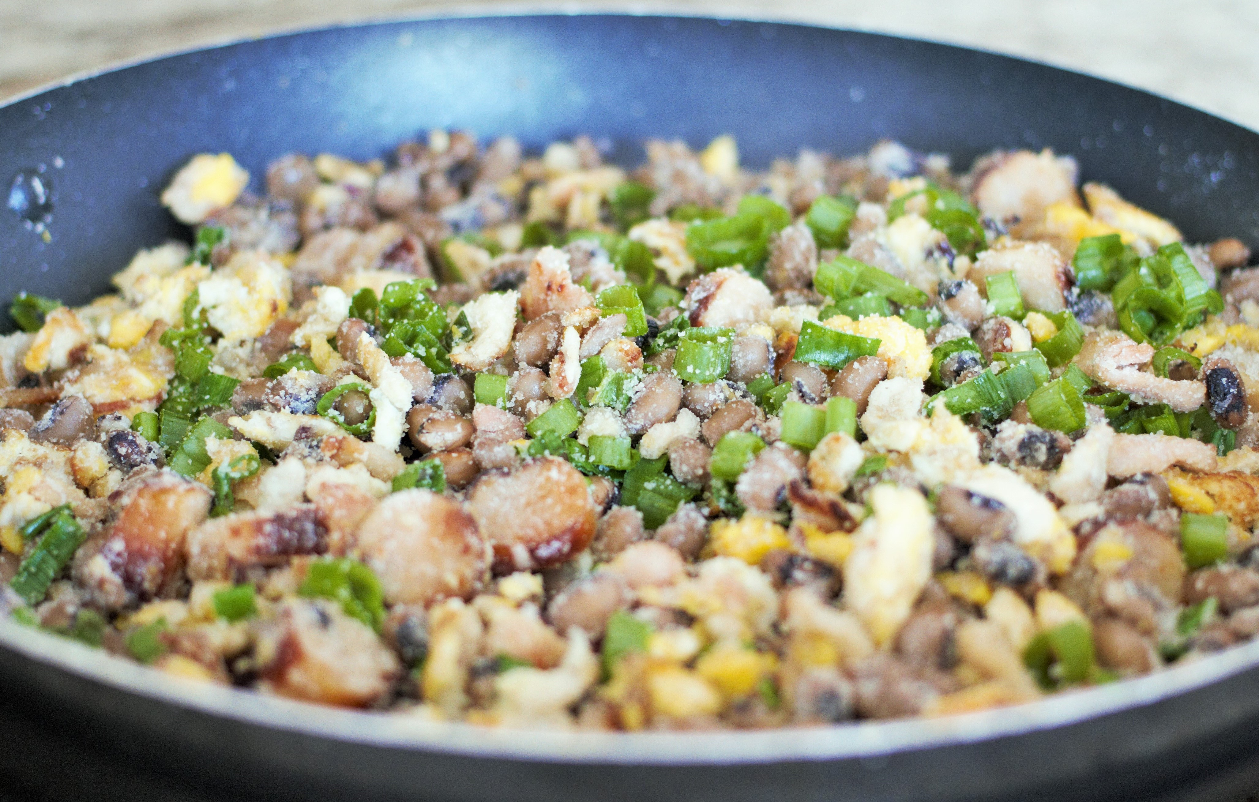 Feijão tropeiro, iguaria típica do Sudeste brasileiro.